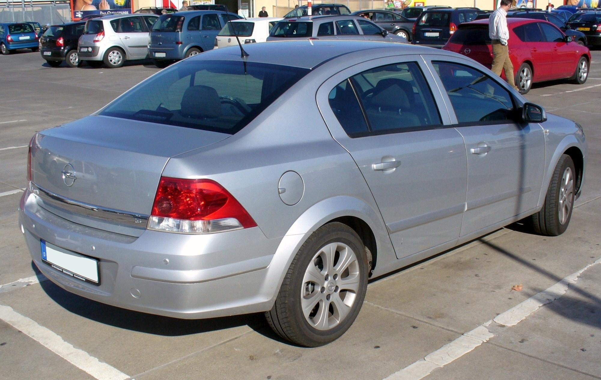 Opel Astra H Stufenheck